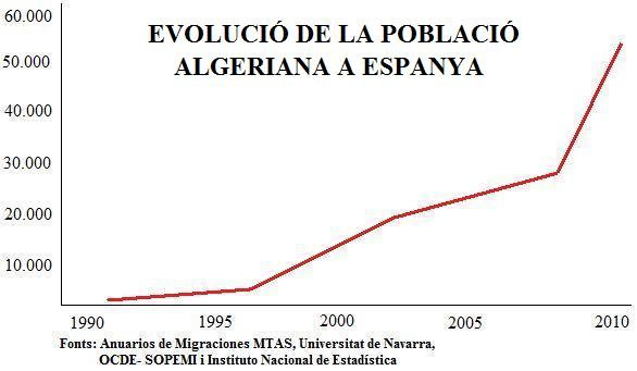 Evolució de la població immigrant algeriana a Espanya. Fonts consultables als següents links